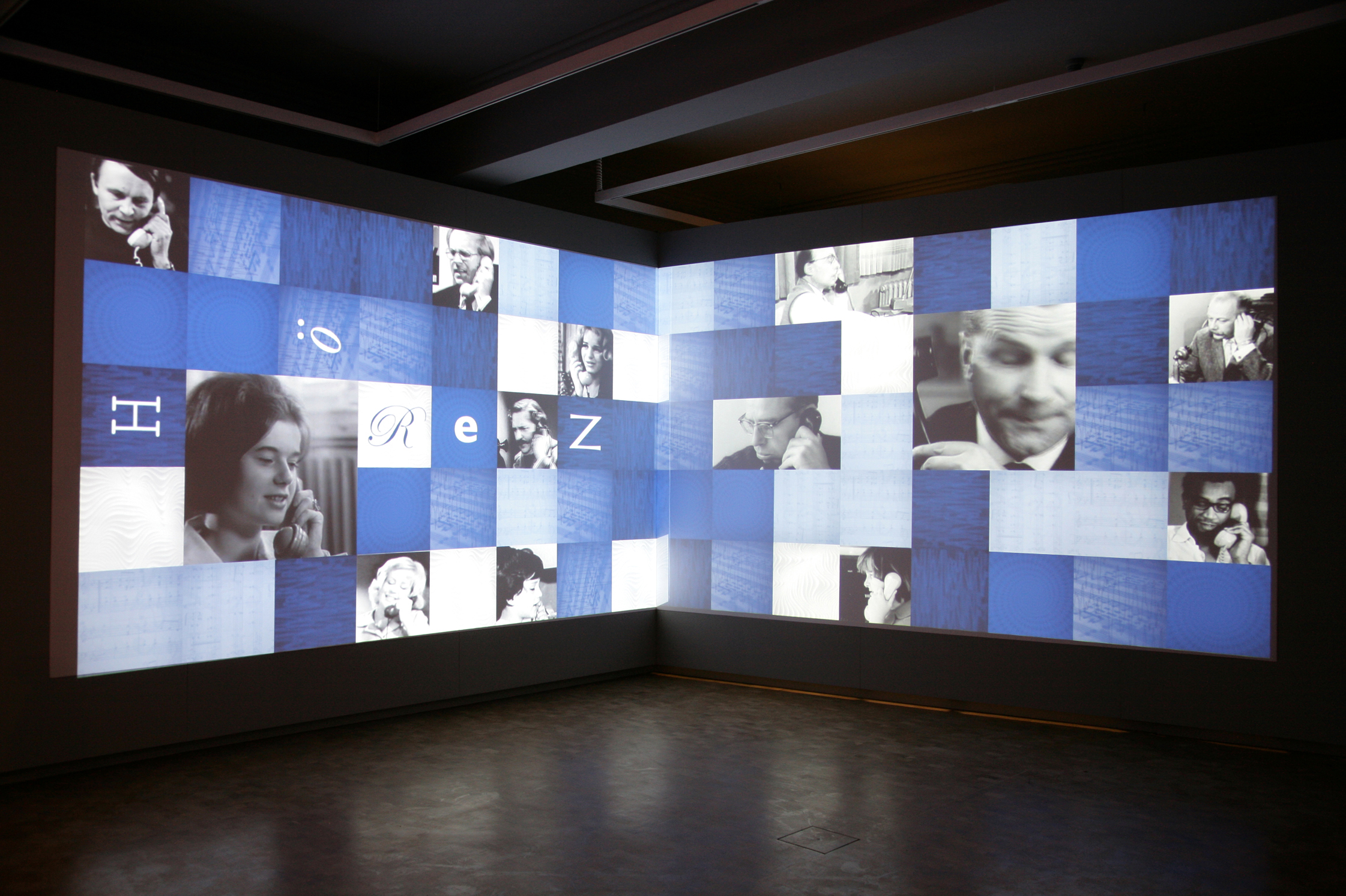 Eingangsbereich des Museums für Kommunikation Nürnberg